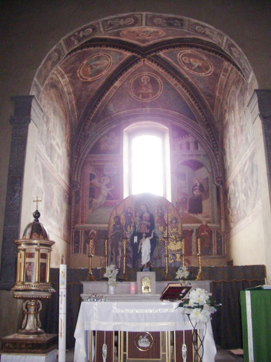 Affreschi dell'abside della Chiesa di San Michele Arcangelo a Paganico, Affreschi di Biagio di Goro Ghezzi, Altare di Guidoccio Cozzarelli